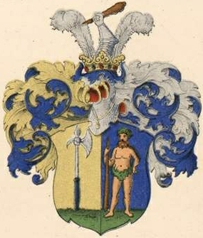 Riesenkampff gen. Rehekampffi suguvõsa aadlivapp